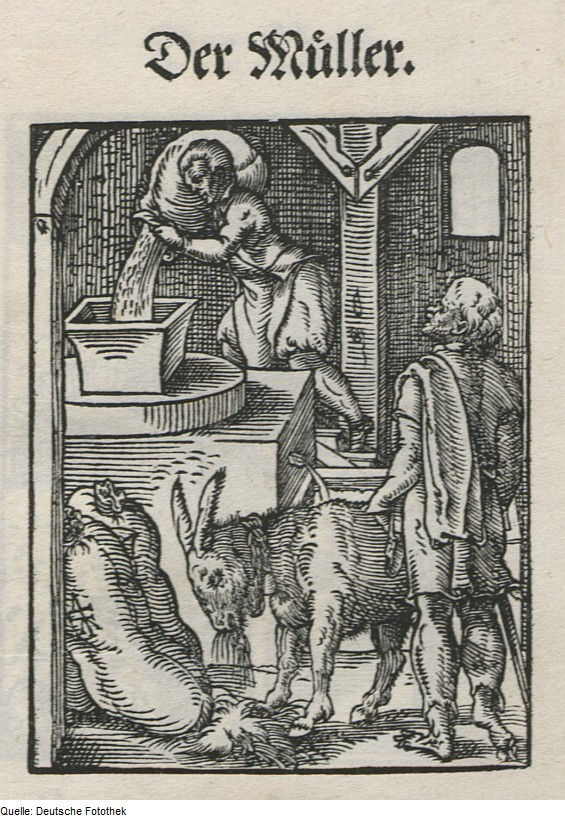 Original image description from the Deutsche Fotothek Ständebuch & Handwerk & Müller